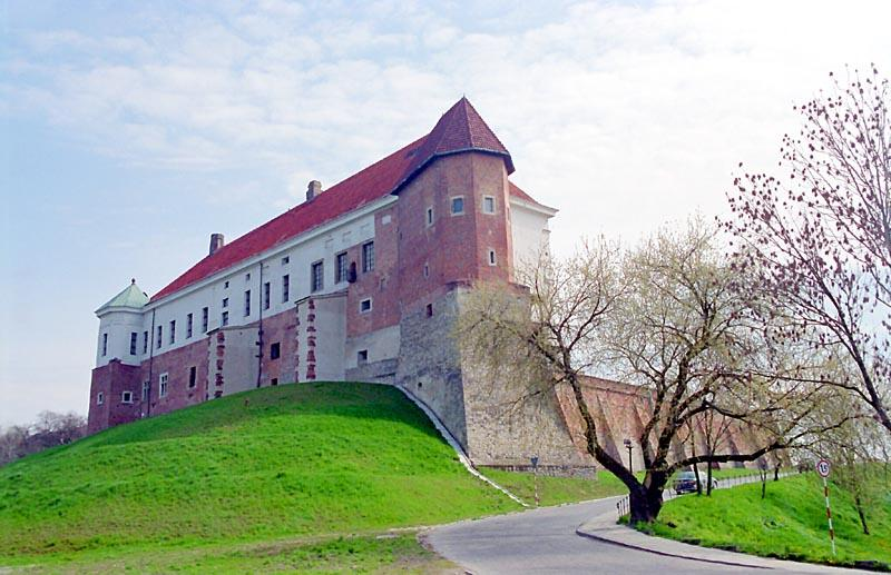 Castle in Sandomierz in Poland